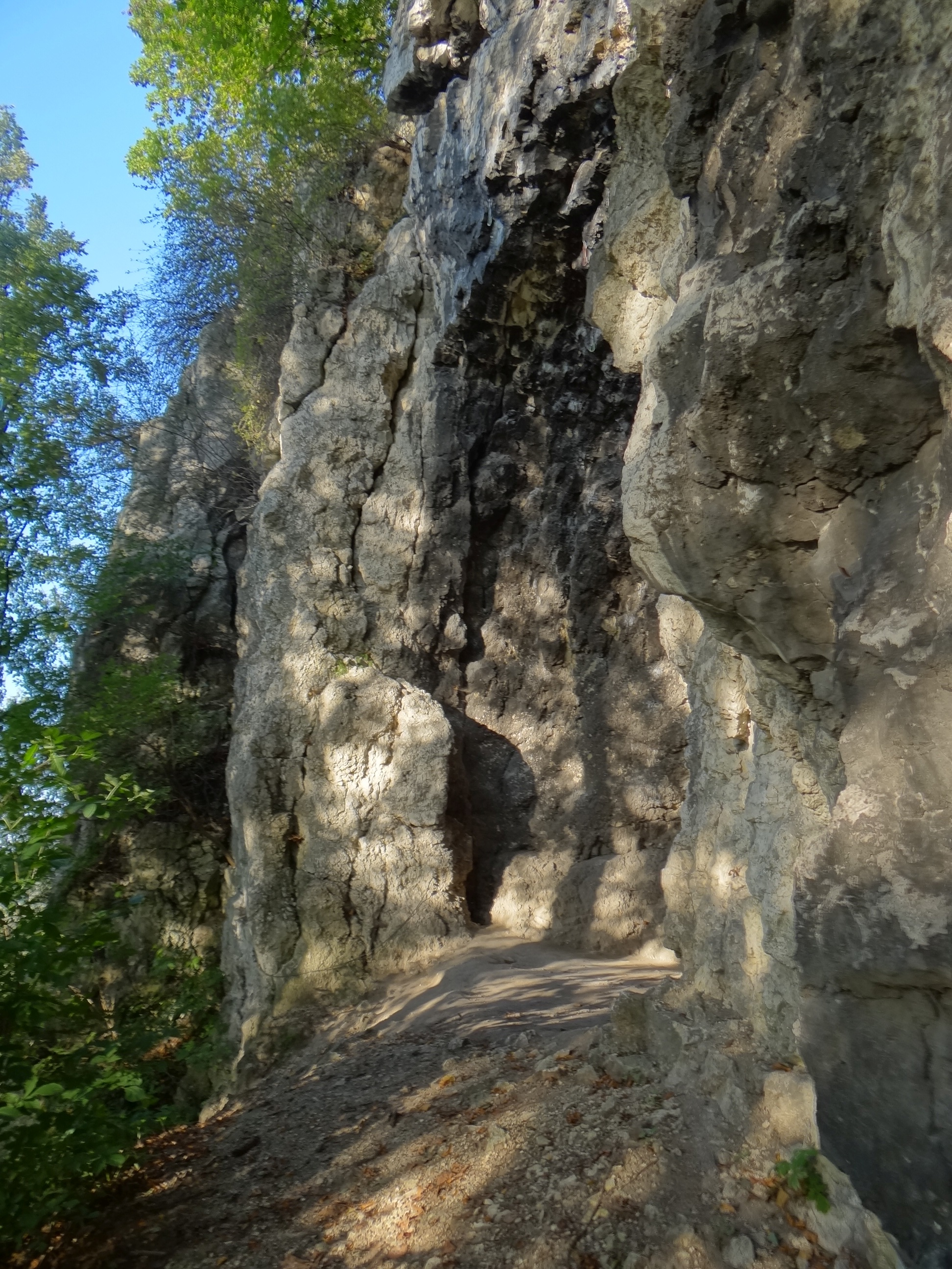 Skała Skurwysyn w Tyńcu nad Wisłą